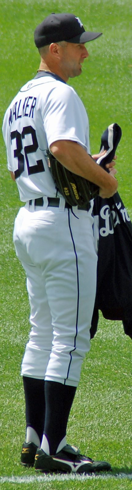 Jamie Walker